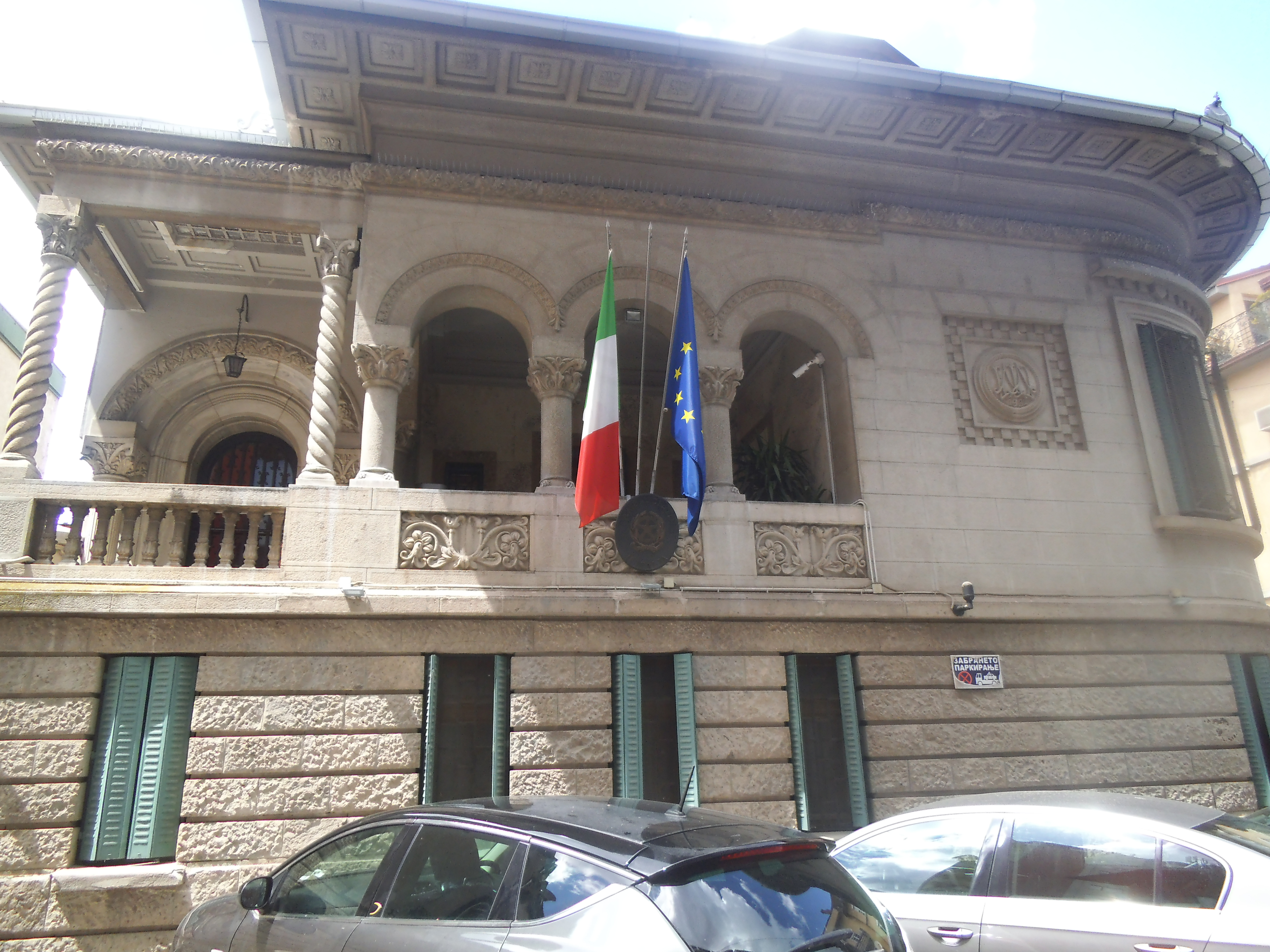 Die italienische Botschaft in Skopje, Nordmazedonien.